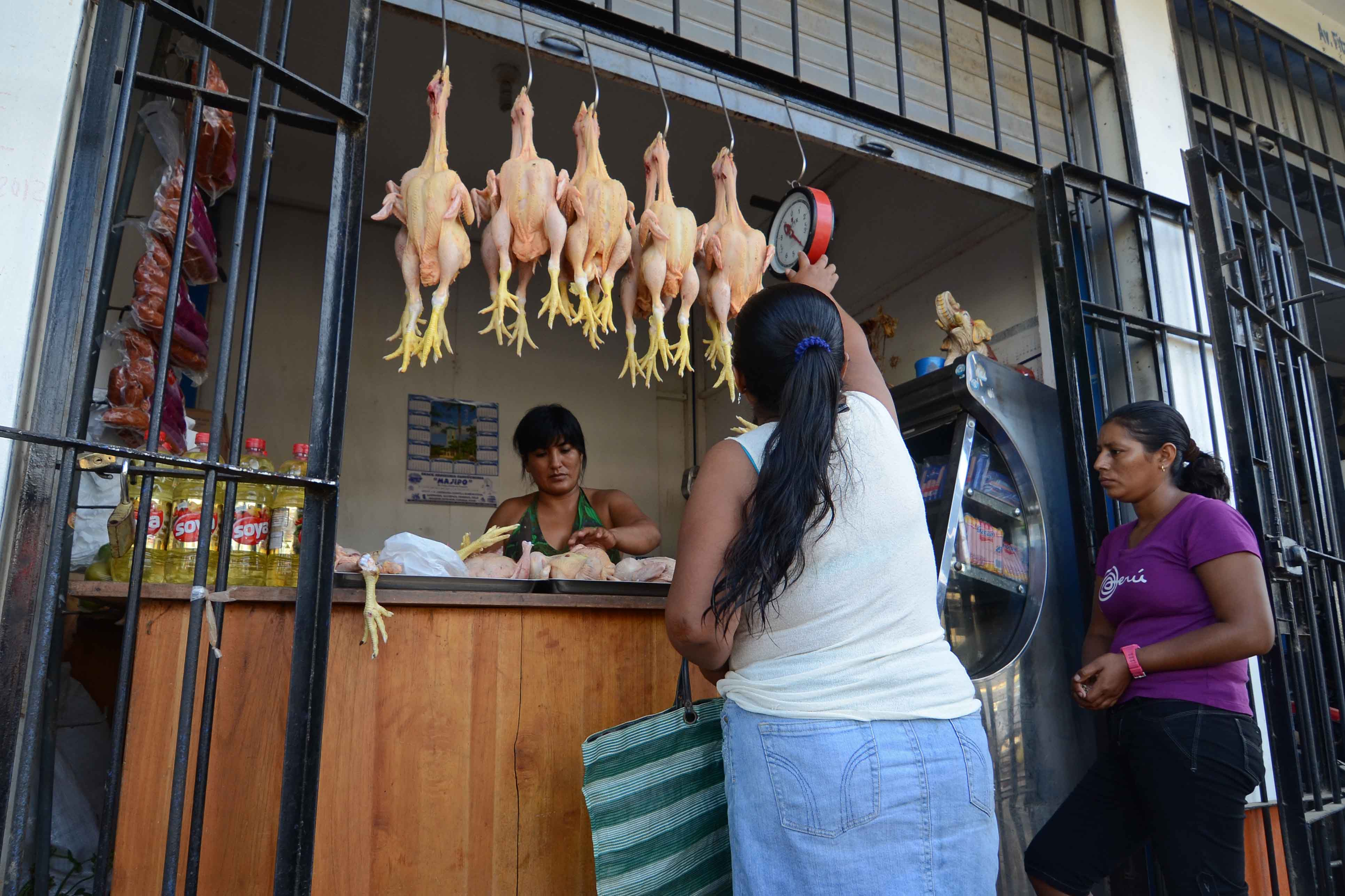 Puerto Maldonado, Madre de Dios, Peru